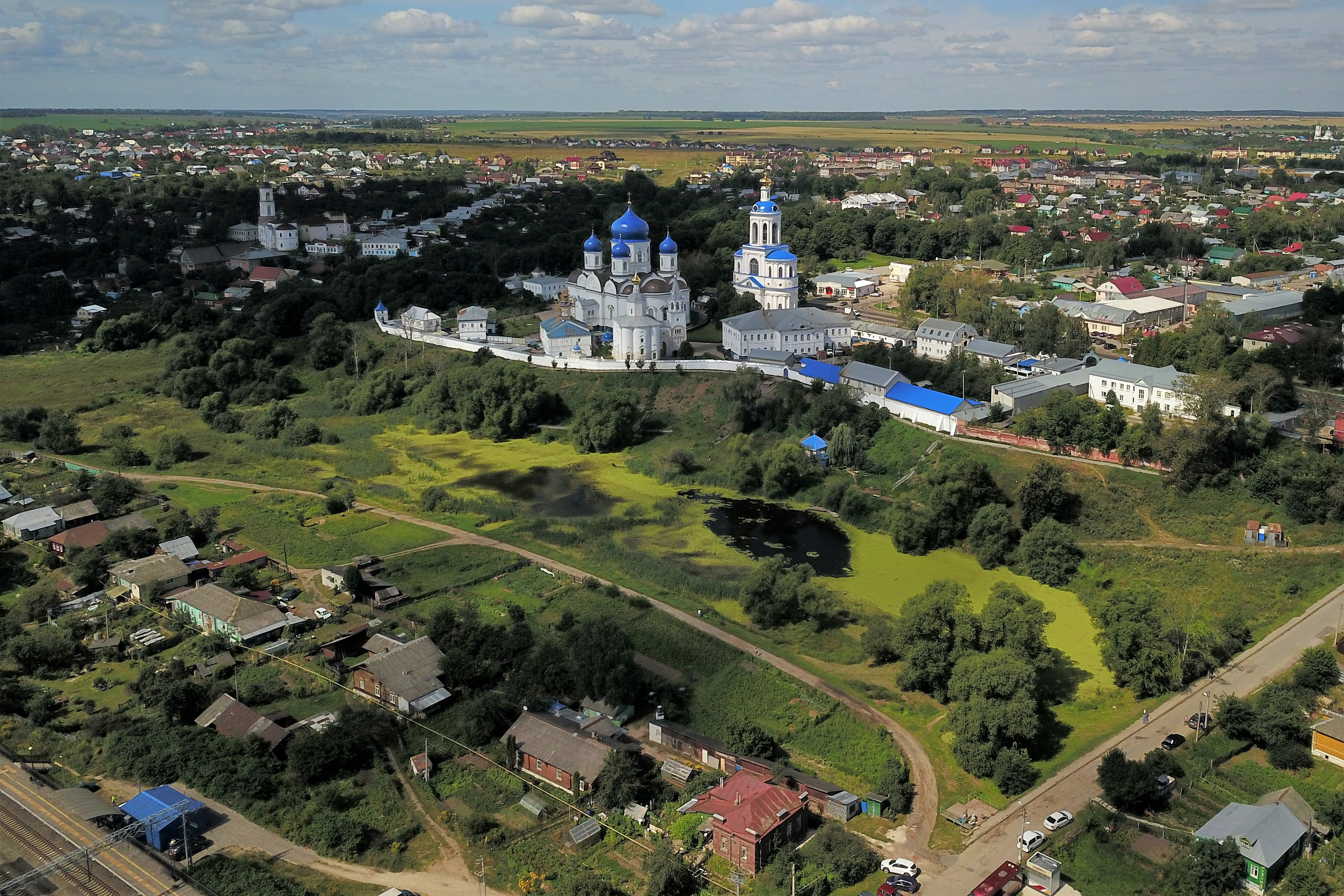 Ансамбль Боголюбовского монастыря (монастырь Боголюбский): Боголюбово, Суздальский район, Владимирская область